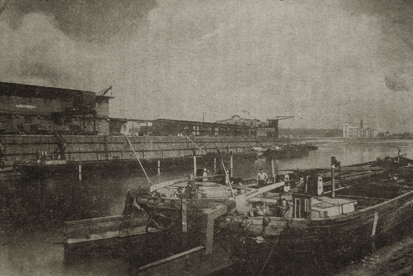 Port rzeczny na Warcie w Poznaniu, około 1929r.